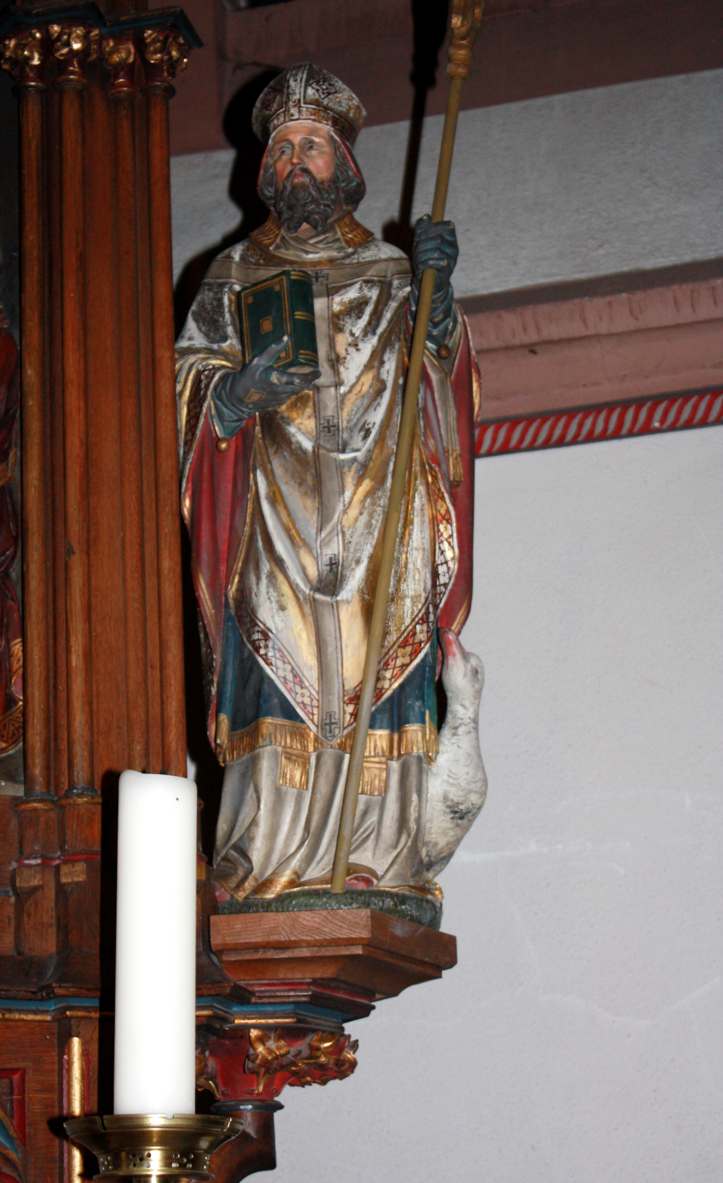 Hürth-Fischenich, St.-Martin-Kirche. Darstellung des Martinus als Bischof.